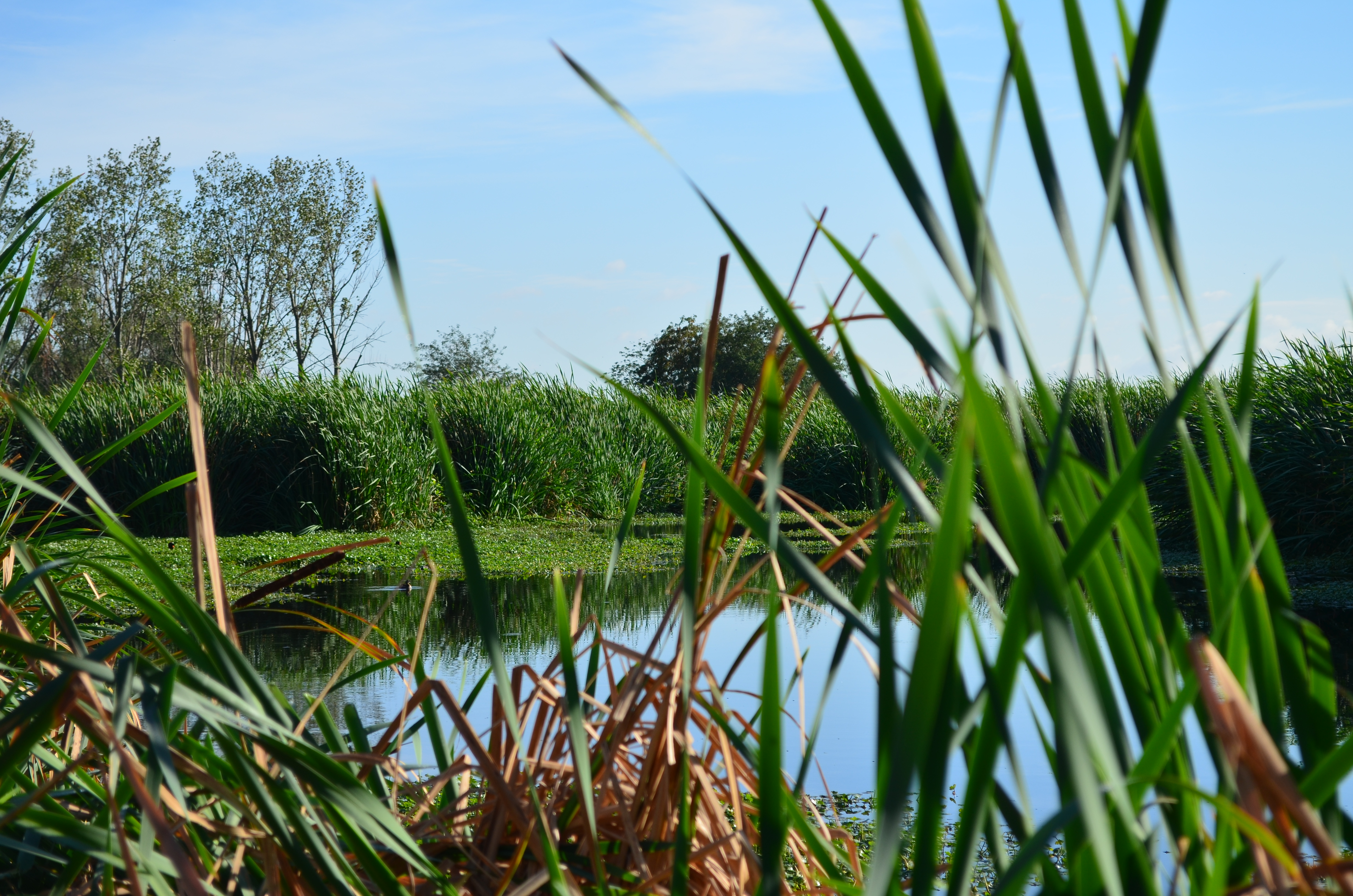 La Reserva Natural cerca de la Planta Potabilizadora de AySA